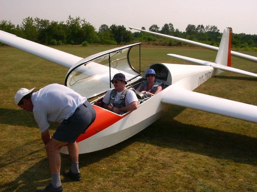 zweefvliegtuig